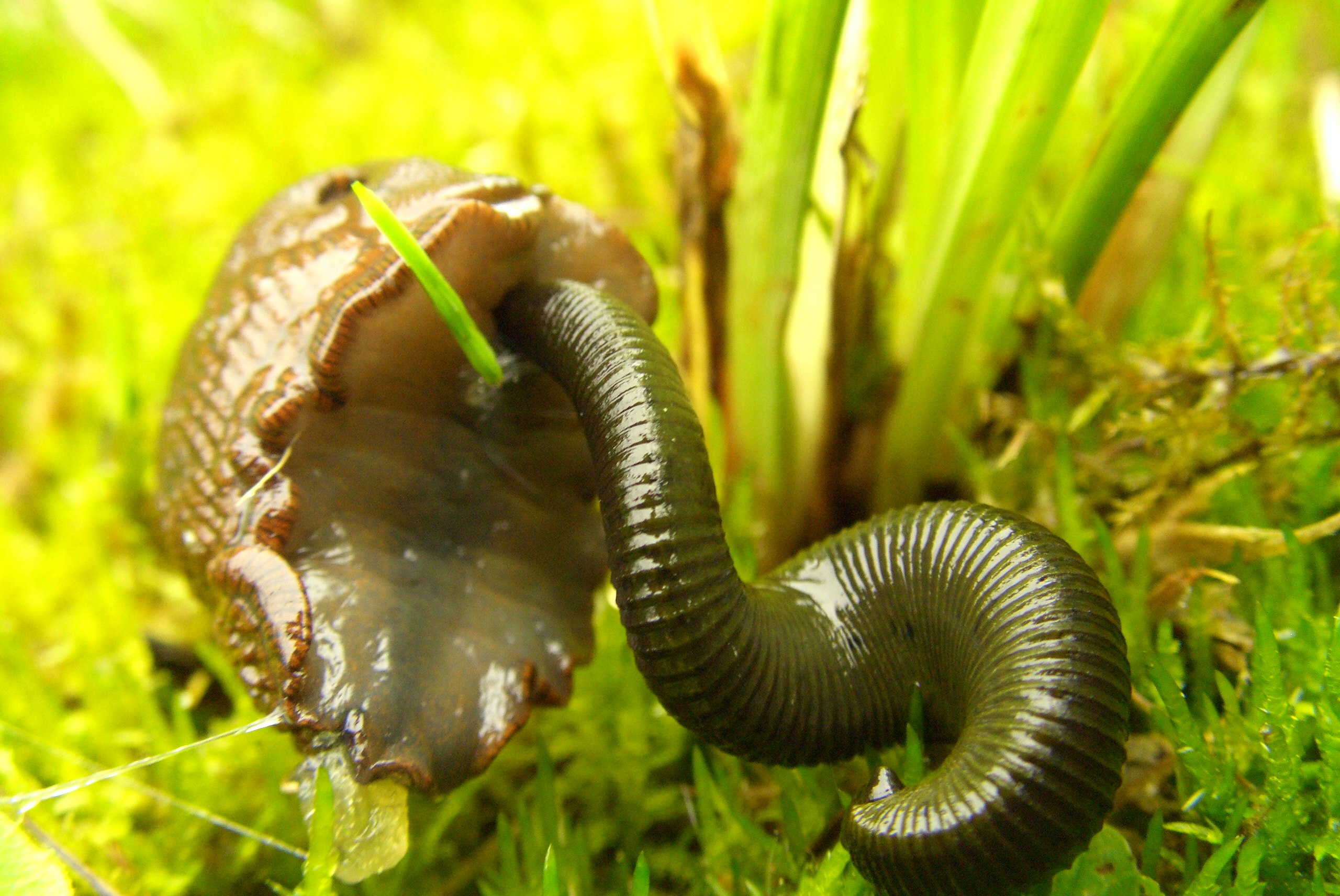 Blutegel als Parasit einer Nacktschnecke 04